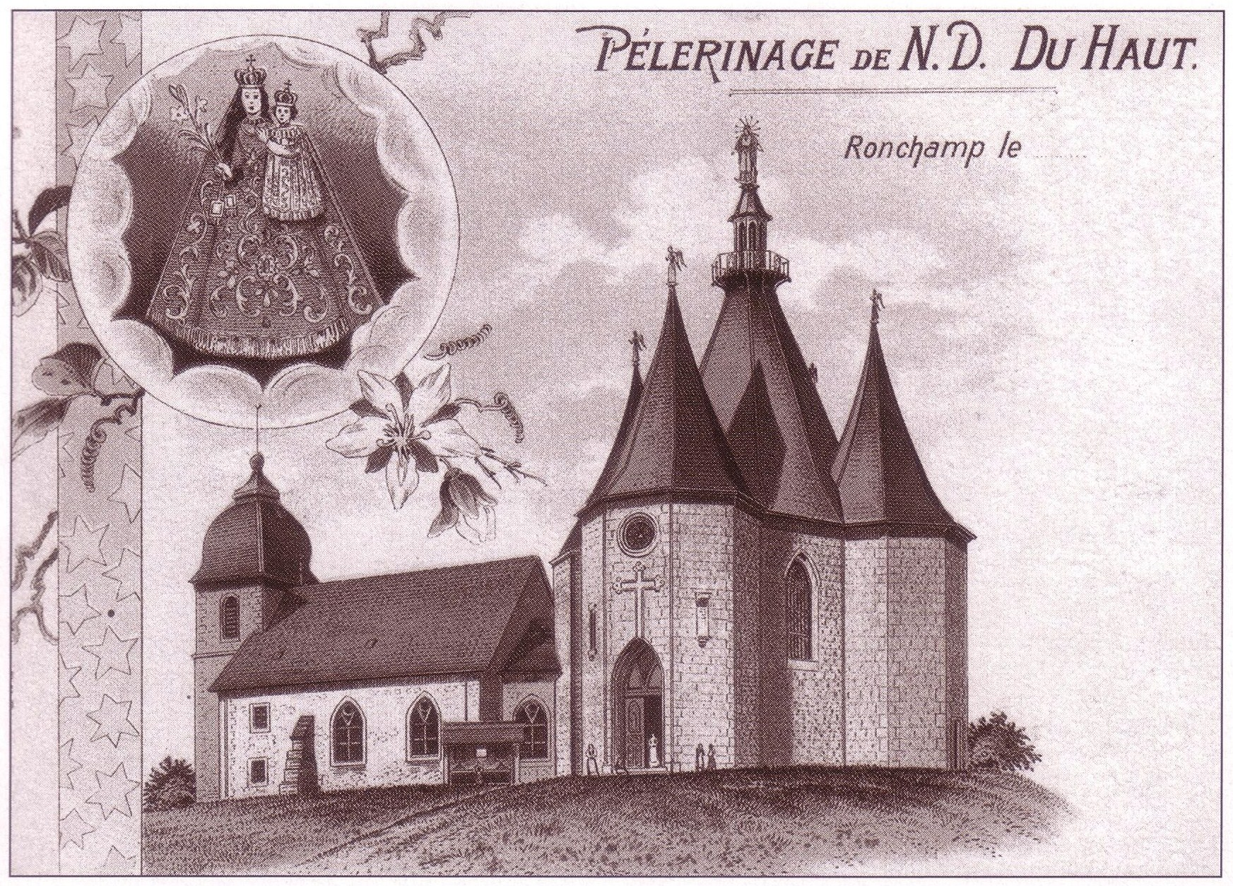 Scan d'une carte postale publiée dans un livre. Cette carte postale est suffisamment âgée pour être dans le domaine public. Il s'agit de l'ancienne chapelle Notre-Dame-du-Haut à Ronchamp, avec clocher comtois.